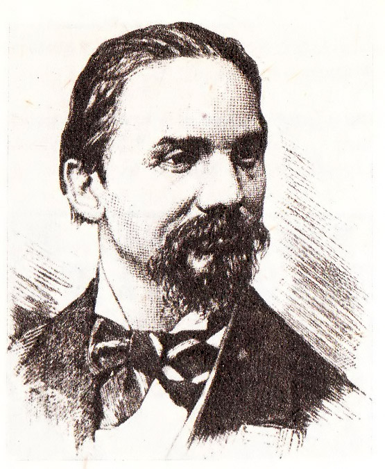 Jan Kleczyński (ur. 8 czerwca 1837 w Janiewiczach na Wołyniu, zm. 15 września 1895 w Warszawie), polski pianista, kompozytor, krytyk muzyczny. Był badaczem twórczości Fryderyka Chopina, zajmował się problematyką interpretacji wykonawczej jego kompozycji. Był również jednym z warszawskich szachistów.